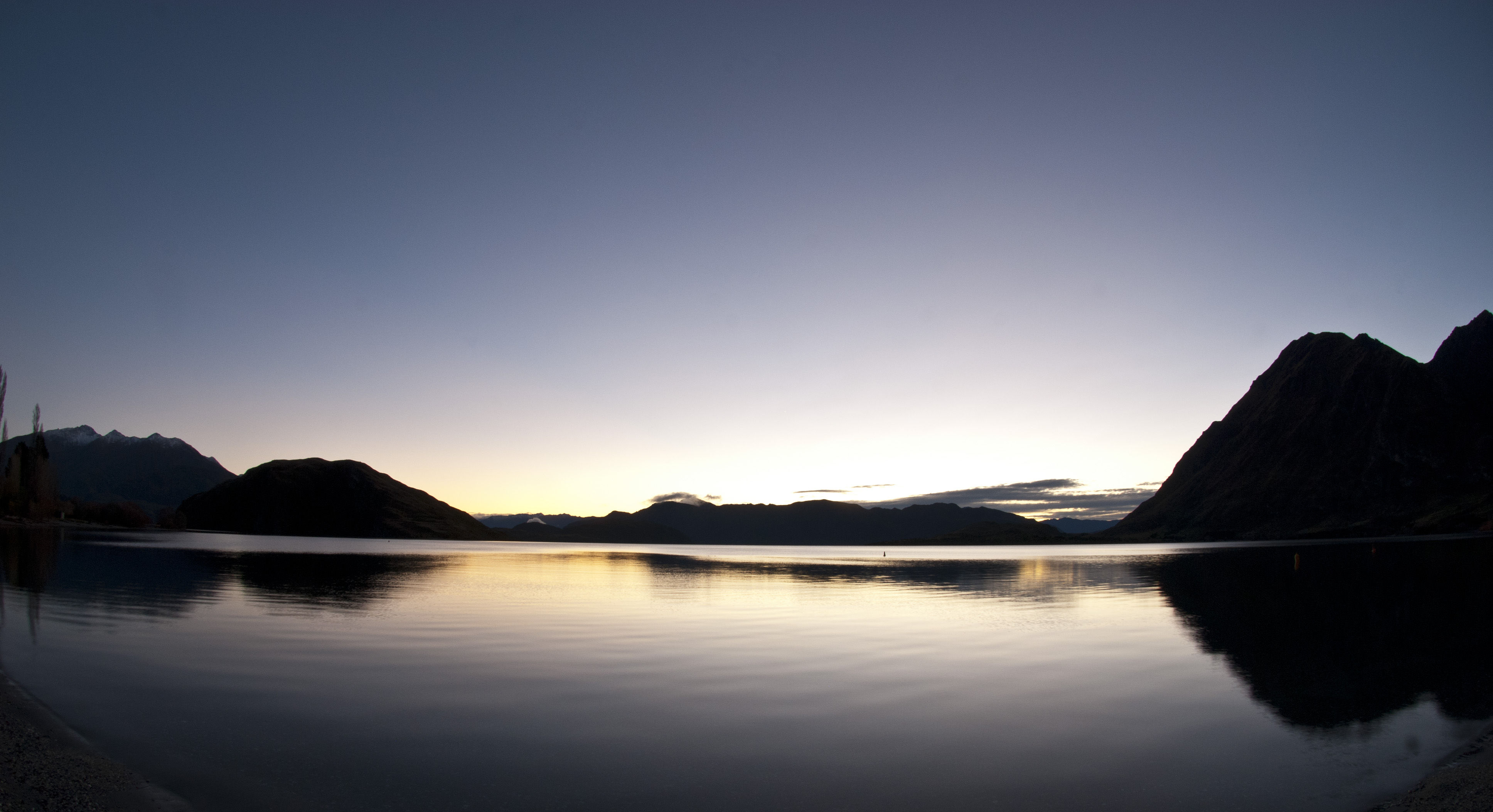 Glendhu Bay